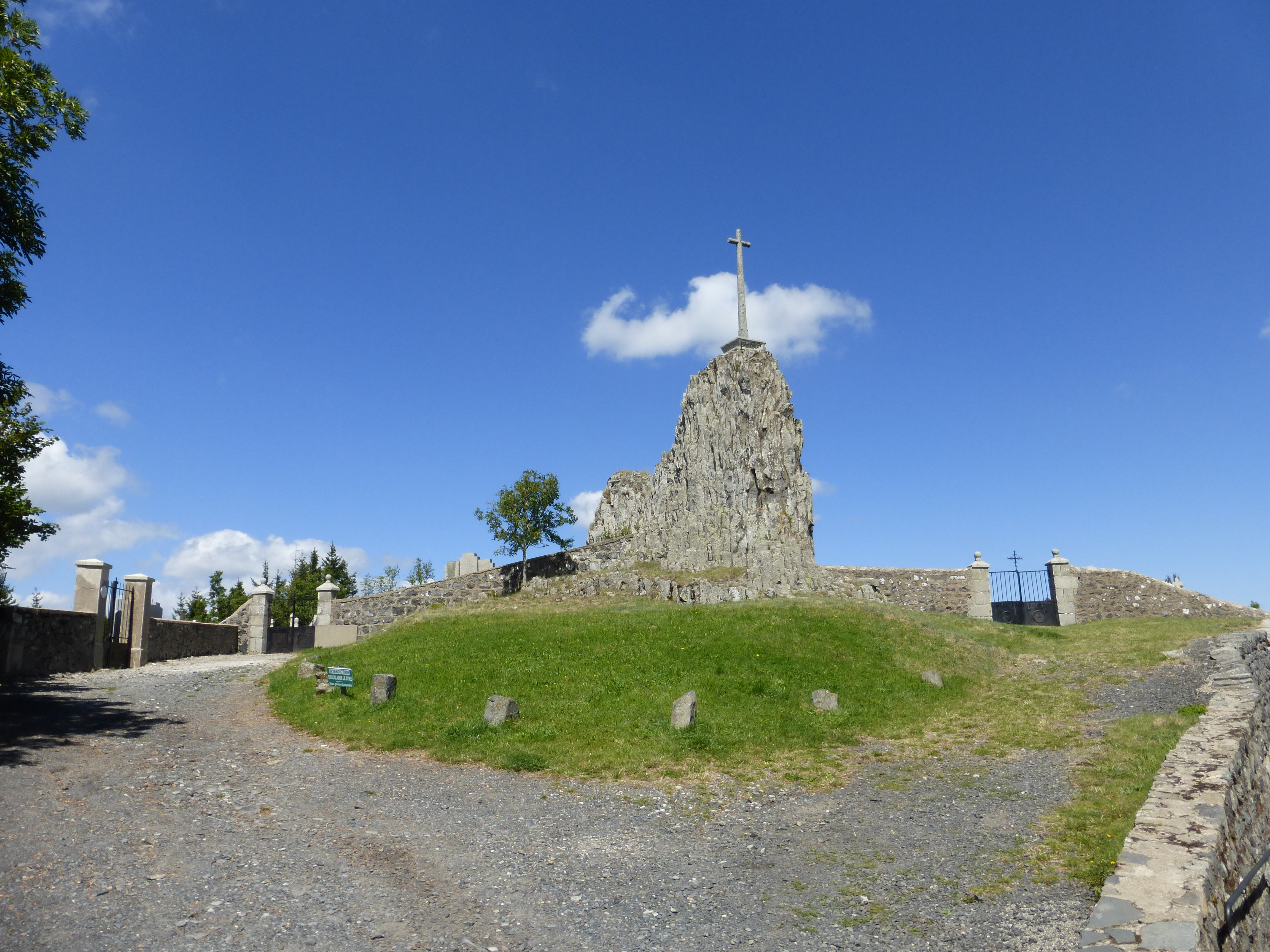 Le dike de Fay-sur-Lignon, surplombant le cimetière. Fay-sur-Lignon (Haute-Loire) Juillet 2016